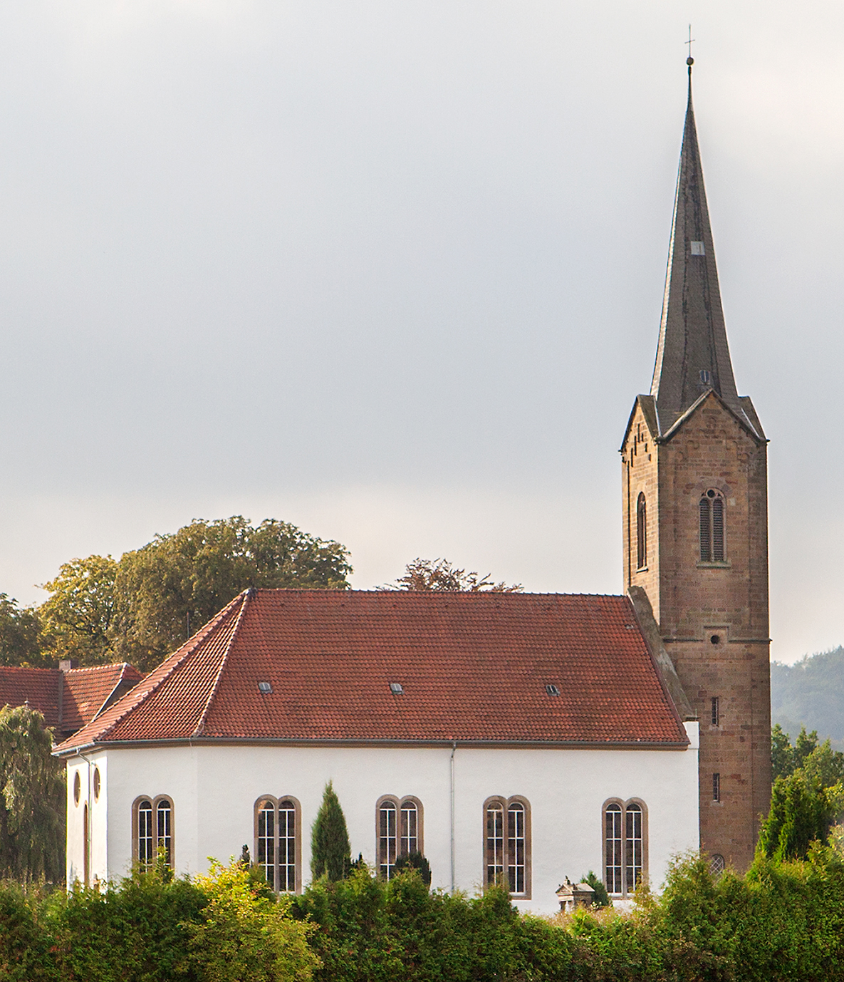 Evangelische Kirche in Wüsten (Bad Salzuflen) This is the photograph of an architectural monument. It is part of the list of cultural monuments of Bad Salzuflen, no. 19